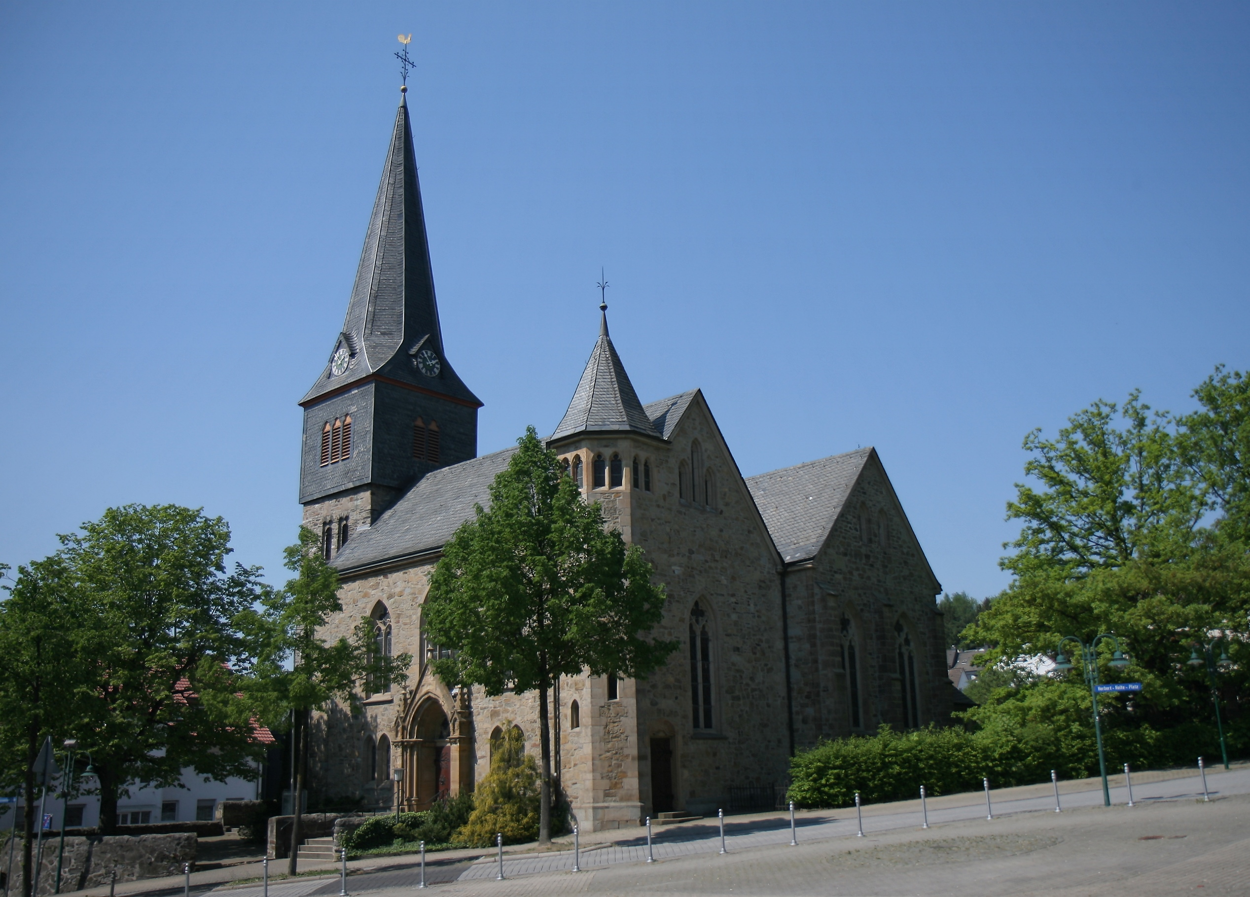 Evangelische Kirche in Iserlohn-Oestrich, Kirchstraße. Denkmal seit 23. Juni 1983.